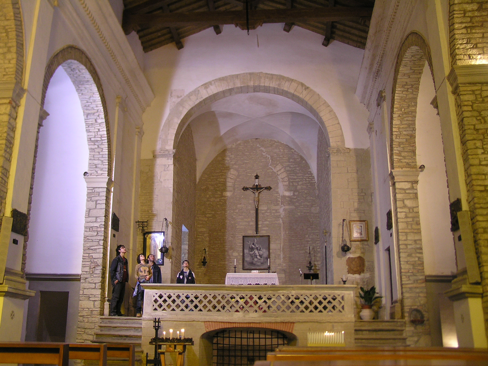 Interno dell'abbazia di Sant'Ellero, Galeata, di rifacimento secentesco, ma in cui si notano ancora diversi particolari dell'originaria abbazia medievale, come l'arco absidale che poggia su mensole scolpite a palmette, l'attacco dell'arco a tutto sesto di una finestra alla destra di esso, poi parzialmente nascosta dalle superfetazioni secentesche ed infine la finestra absidale tamponata.